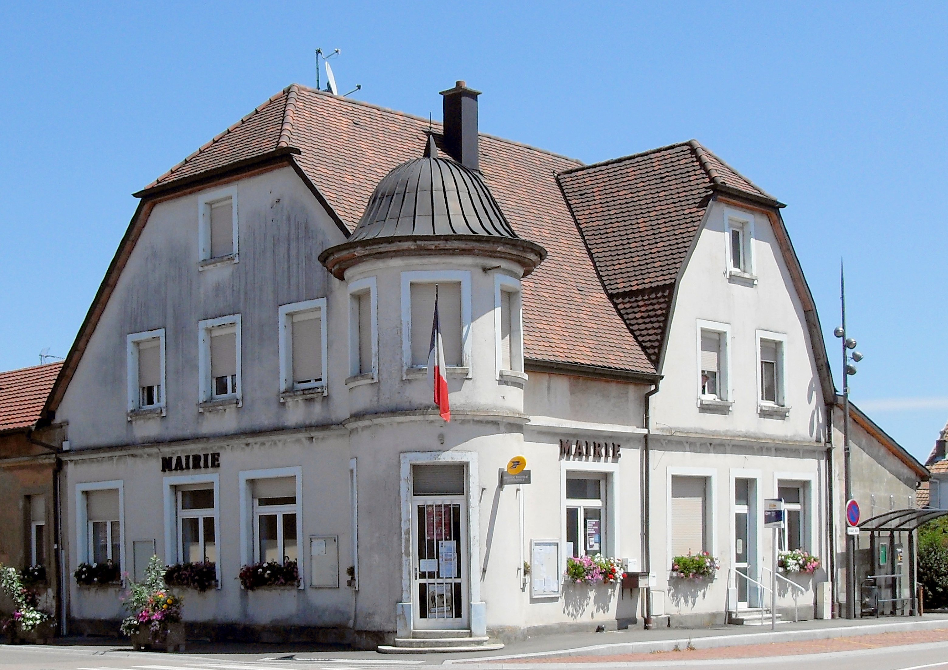 L'ancienne mairie de Guewenheim (jusqu'à 2013)